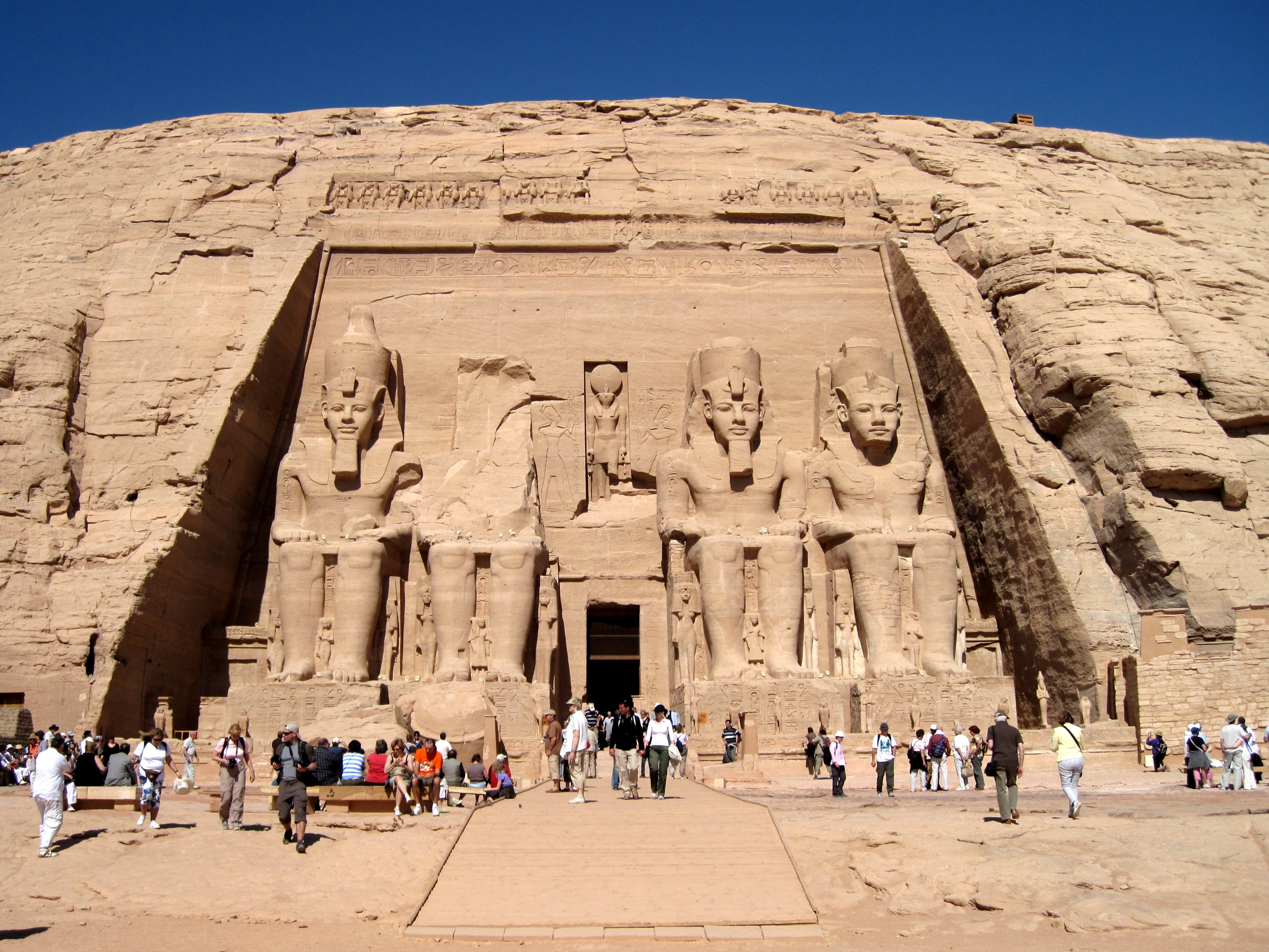 Großer Tempel von Abu Simbel, Ägypten